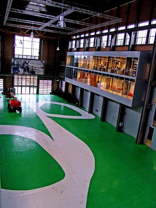 Benjamin Derksen (vrije licentie)